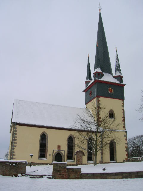 Spätgotische Kirche in Haunetal-Neukirchen, Deutschland. Selbst aufgenommen am 29. Januar 2006